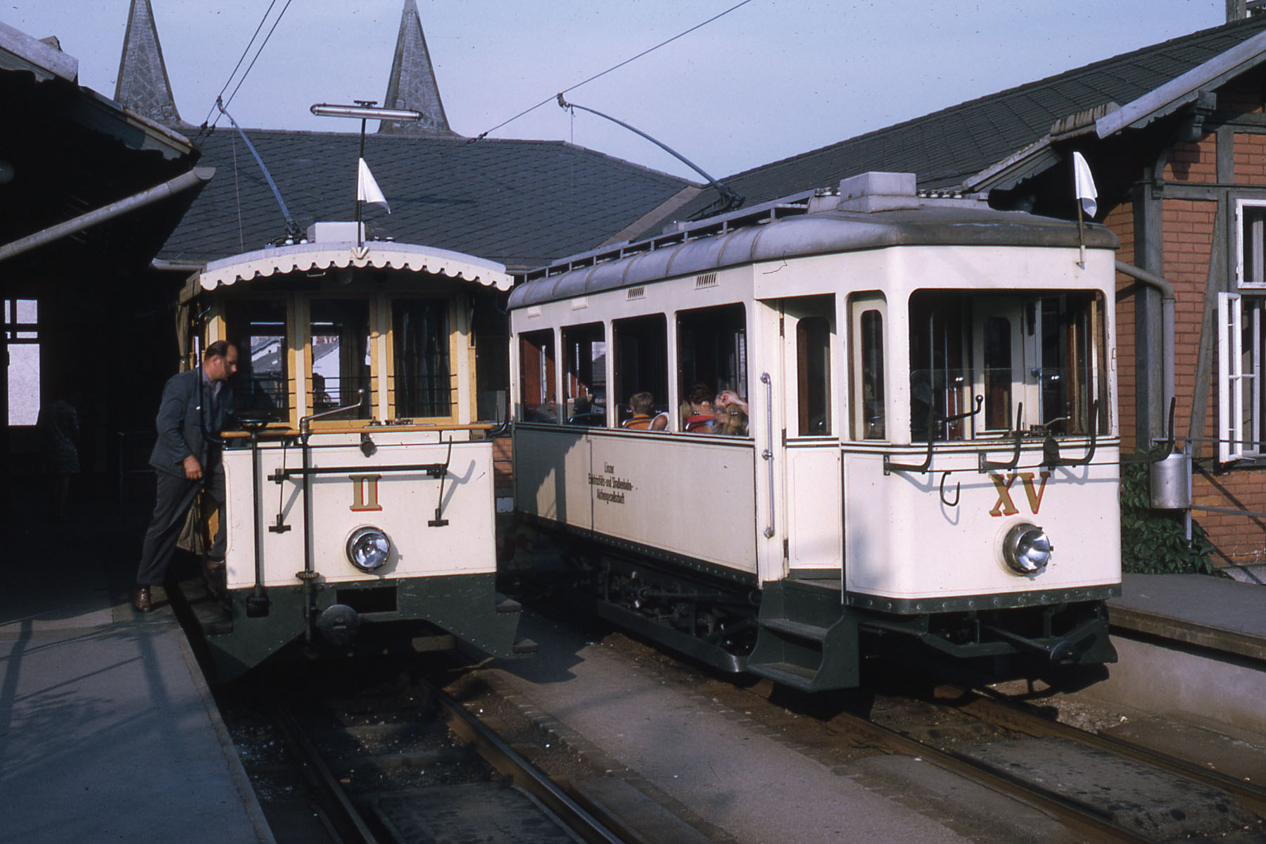 Pöstlingbergbahn, Sommertriebwagen II und Triebwagen XV im Pöstlingbergbahnhof in Urfahr.